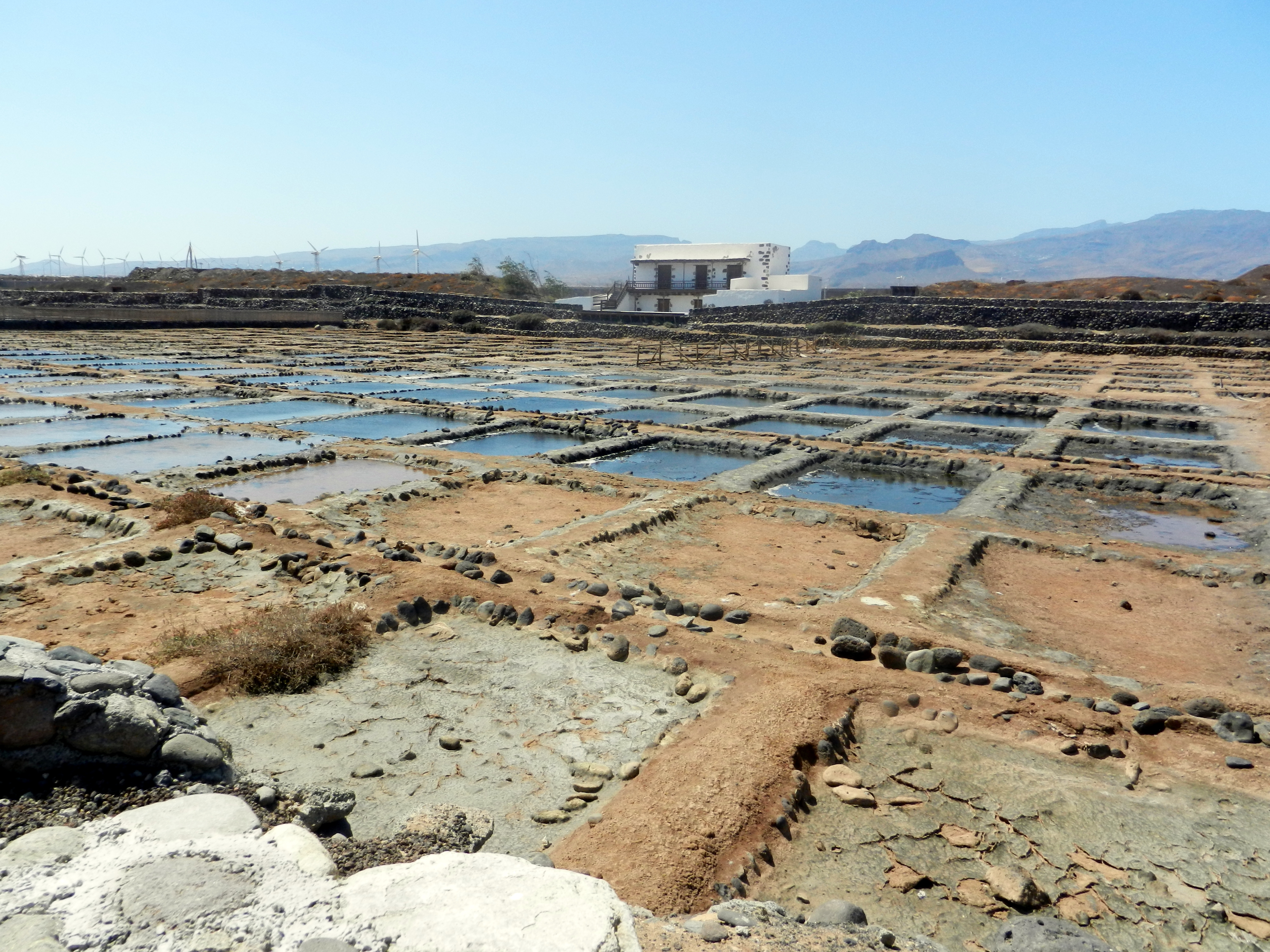 Casa del Obispo mit Verdunstungsbecken im Vordergrund.